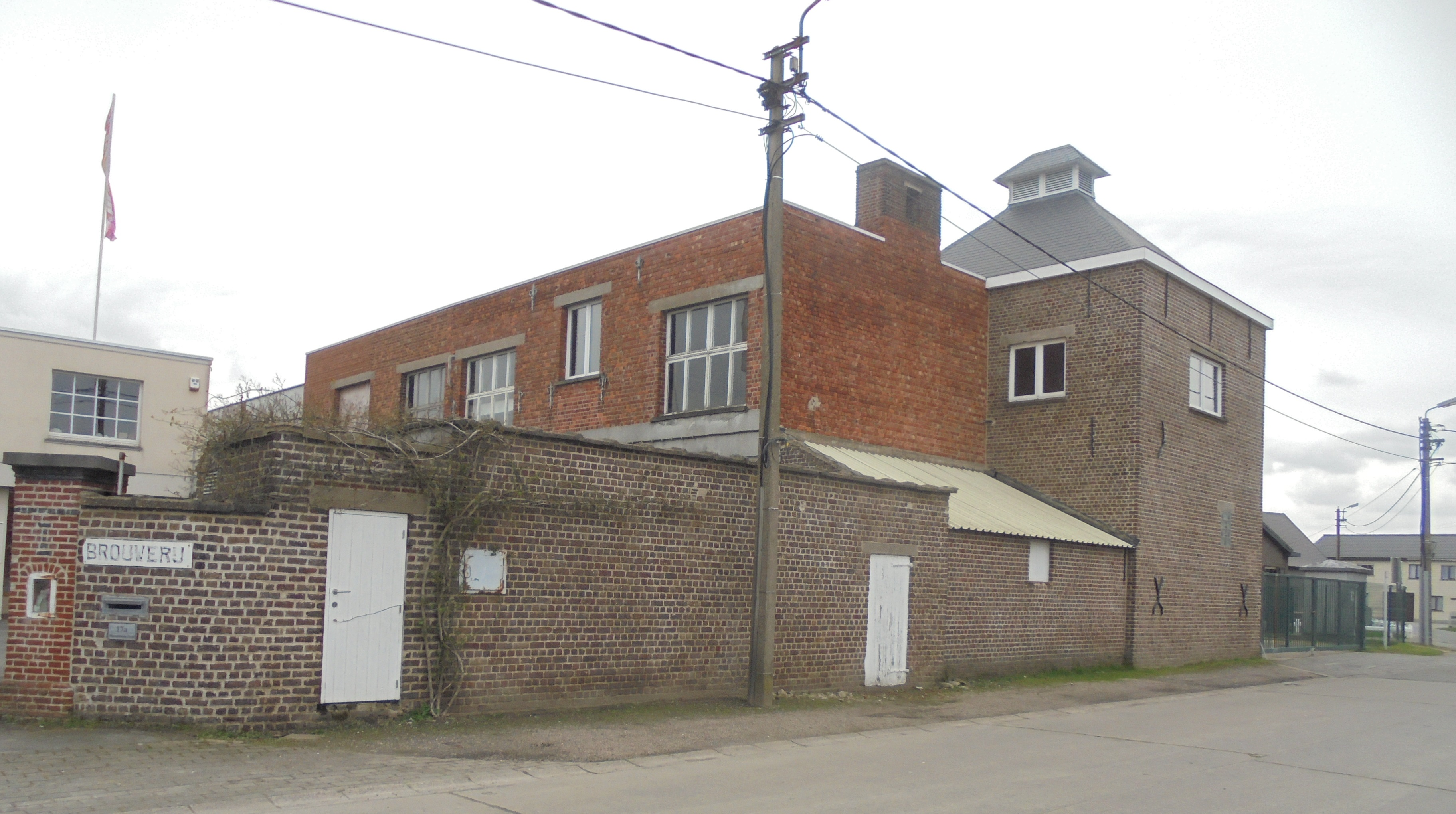 Voormalige Brouwerij Neyt - Molenhoek - Belzele - Evergem - Oost-Vlaanderen - België.